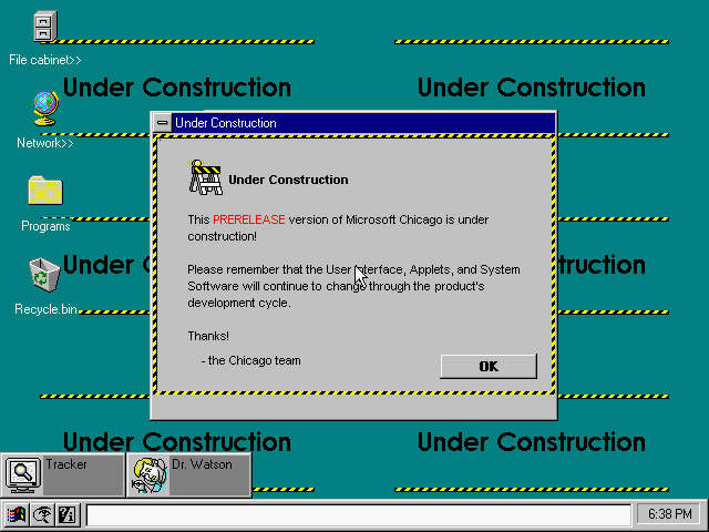 Schermata del desktop di Chicago build 58s in esecuzione su PCem.